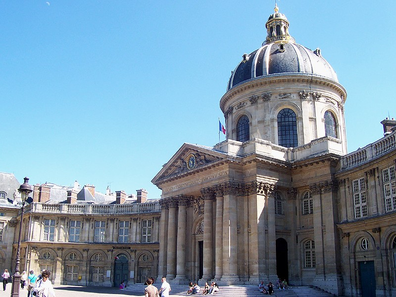 Parigi - Institut de France